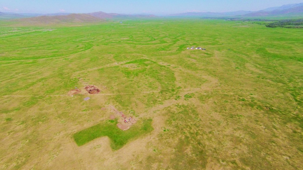 Монгол: Гуа дов суурингийн дэвсгэр зураг.